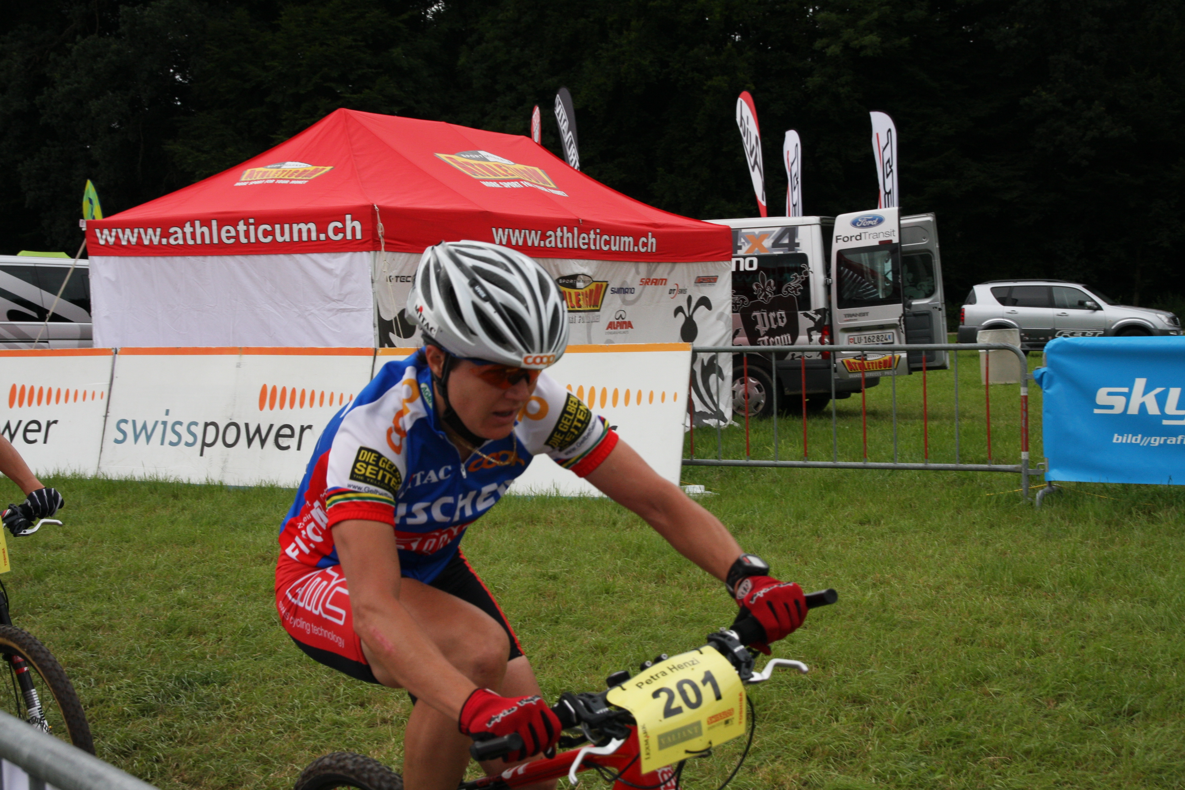 Petra Henzi, die mehrfache Weltmeisterin